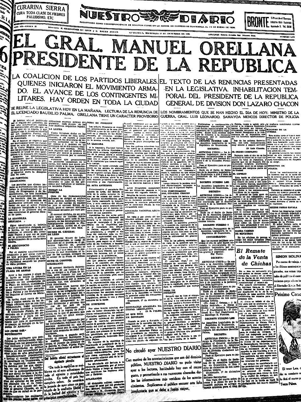 Orellanagolpenoticia